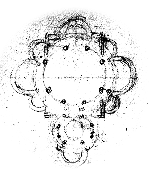 Planta del Hotel Atracción, dibujo de Gaudí.